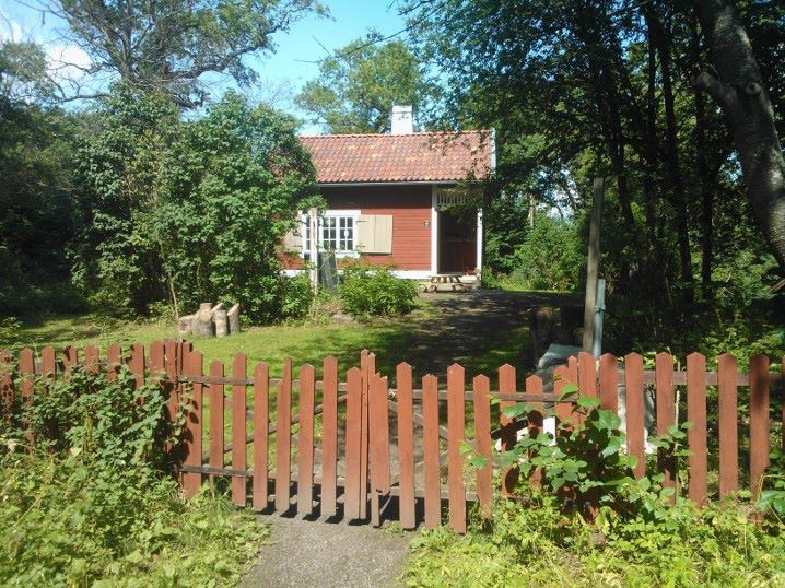 Stuga som nattvakten till "Kungens får" bodde i.